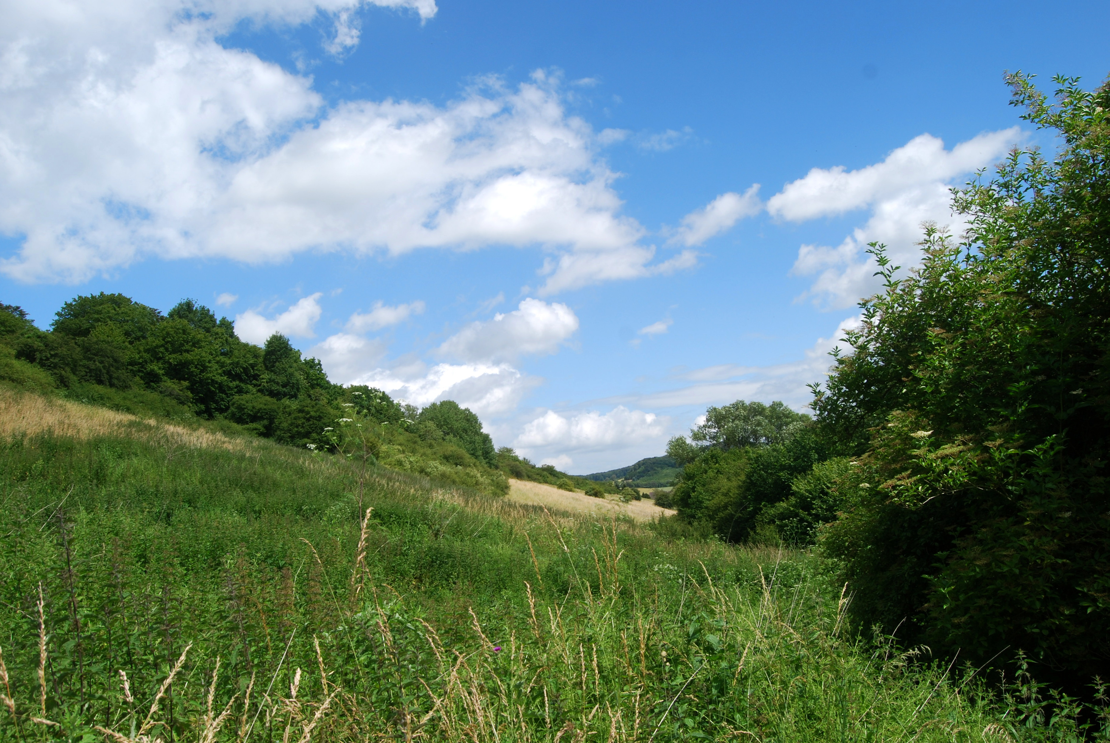 Naturschutzgebiet Steinberg bei Wesseln